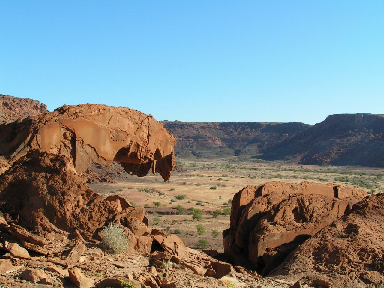 Twyfelfontein in Namib Desert